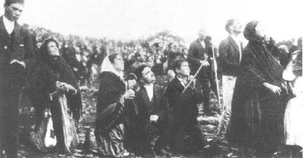 La foule contemple le miracle de Fatima